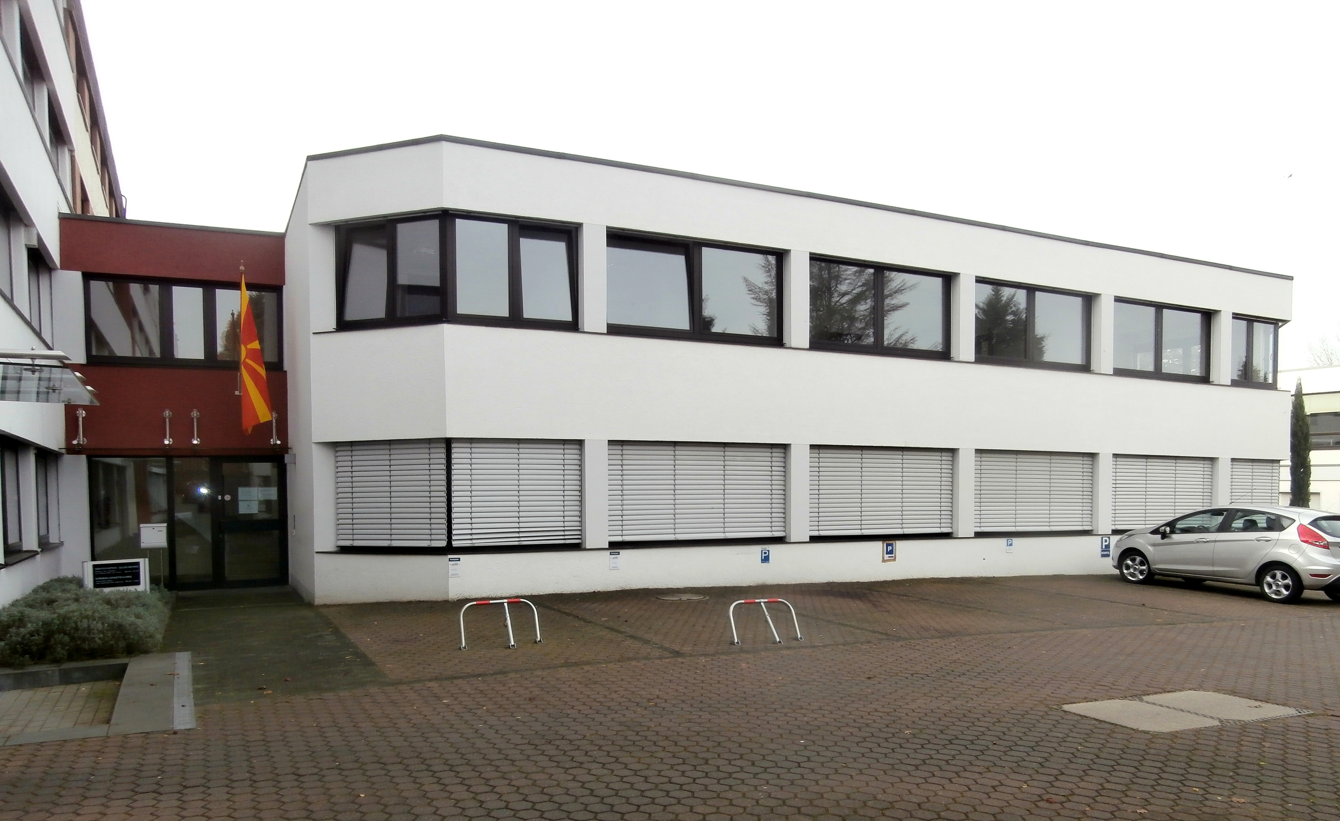 Außenstelle der Botschaft der Republik Makedonien, Heilsbachstraße 24, Bonn-Duisdorf